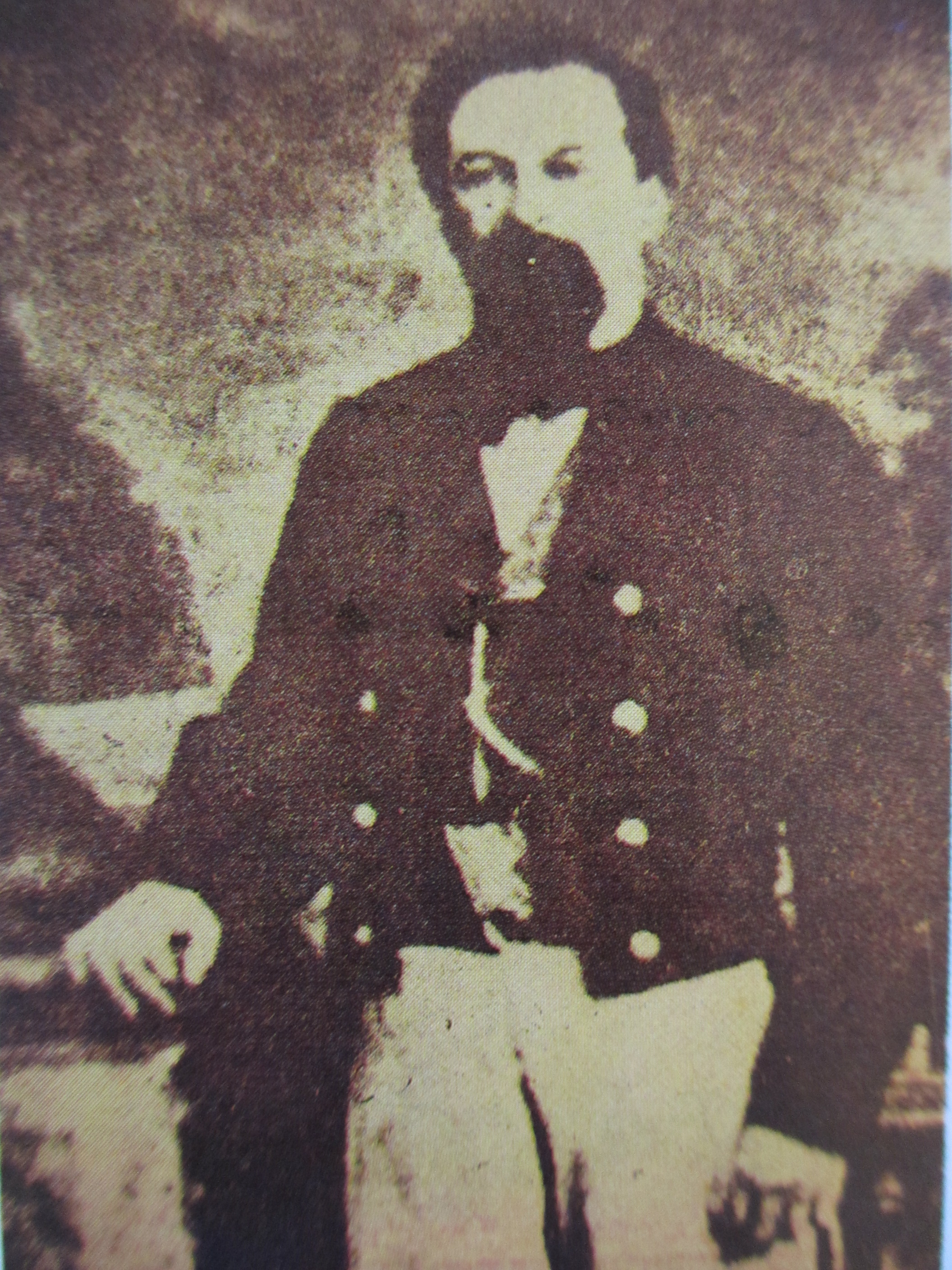 Coronel Juan Bautista Traconis. Nació en Mérida Yucatán, México, el 27 de diciembre de 1809. El 25 y 26 de octubre de 1846 siendo gobernador del estado de Tabasco, México, comandó a las fuerzas tabasqueñas que derrotaron a las tropas estadounidenses comandadas por el General Perry consiguiendo una histórica victoria. El 9 de noviembre de 1846 declaró a Tabasco separado de México.